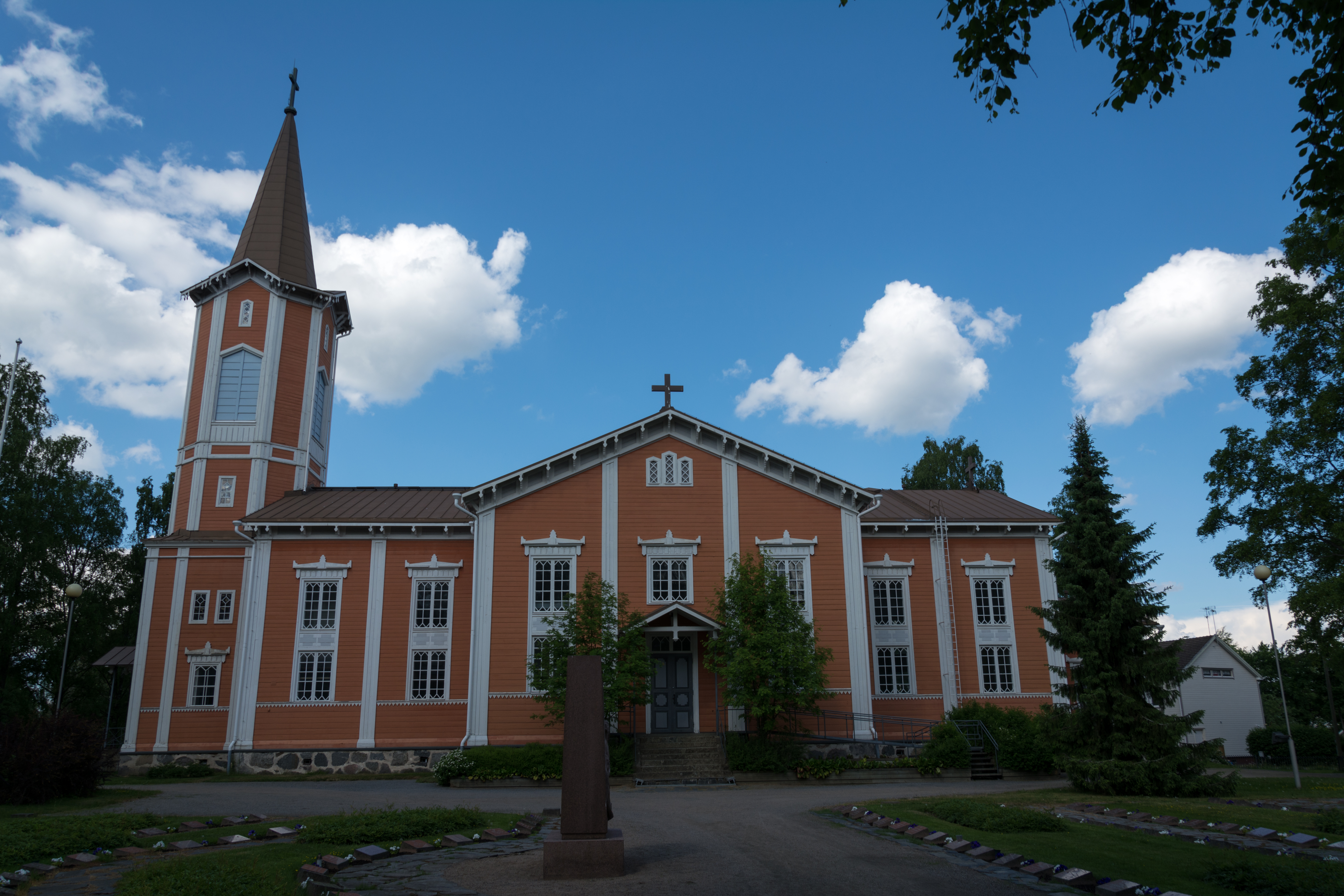 Suonenjoen kirkko